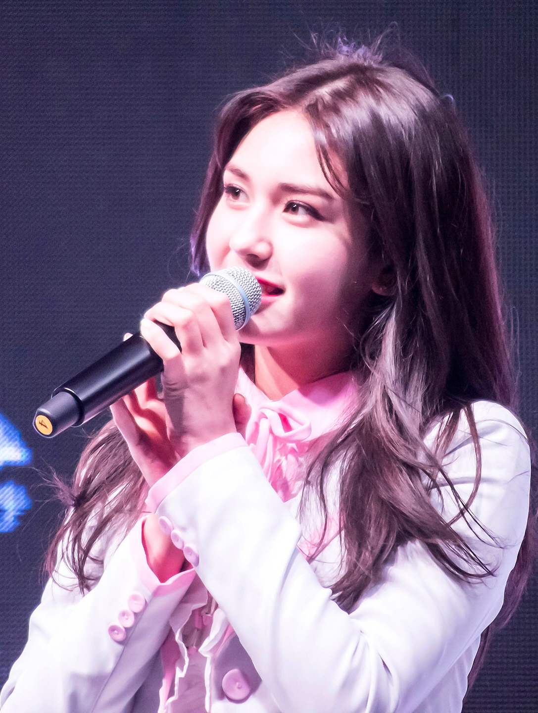 161219 불빛거리 출정식 아이오아이 직찍 업로드